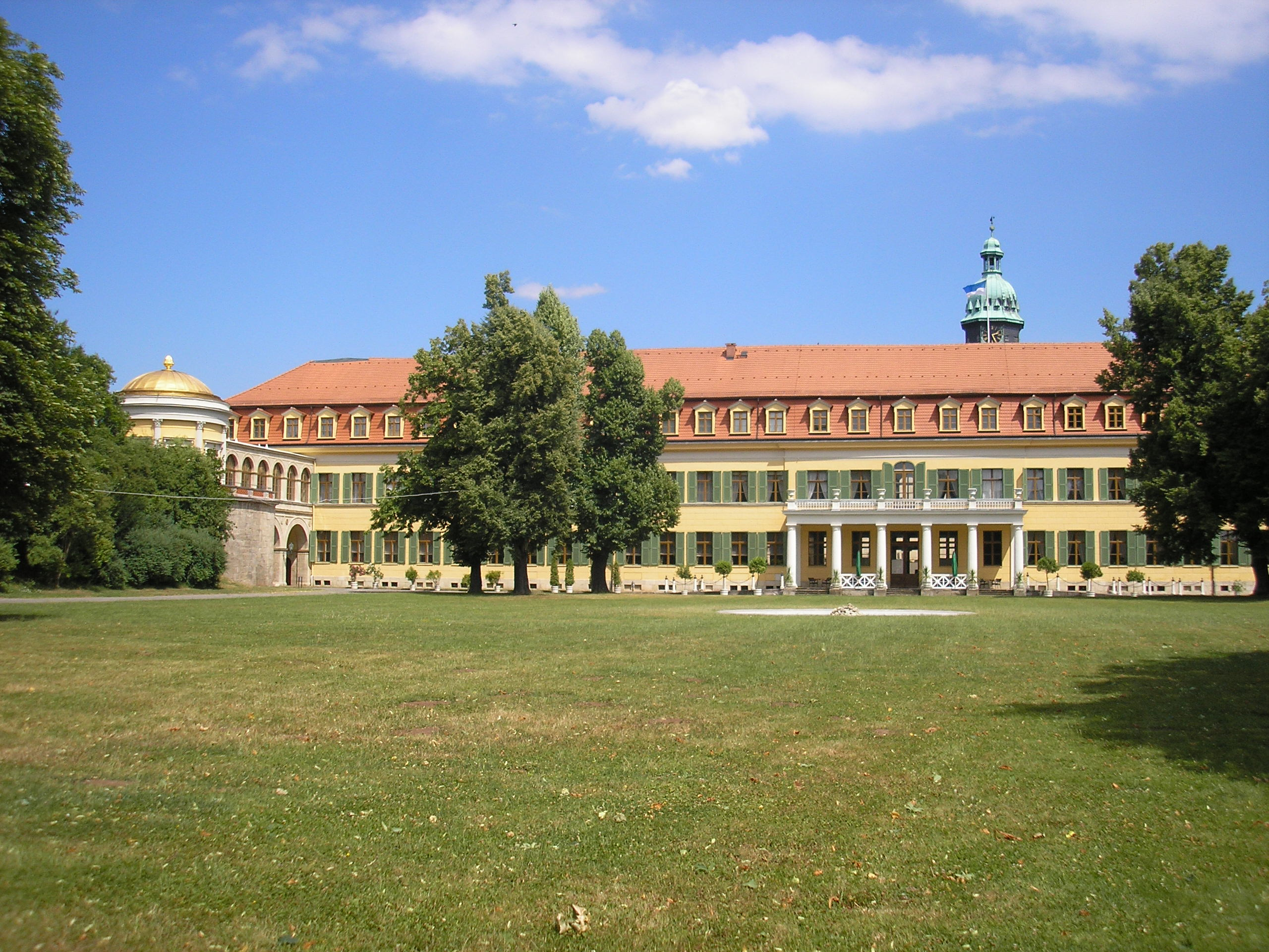 Gartenfassade des Schlosses in Sondershausen (Thüringen).